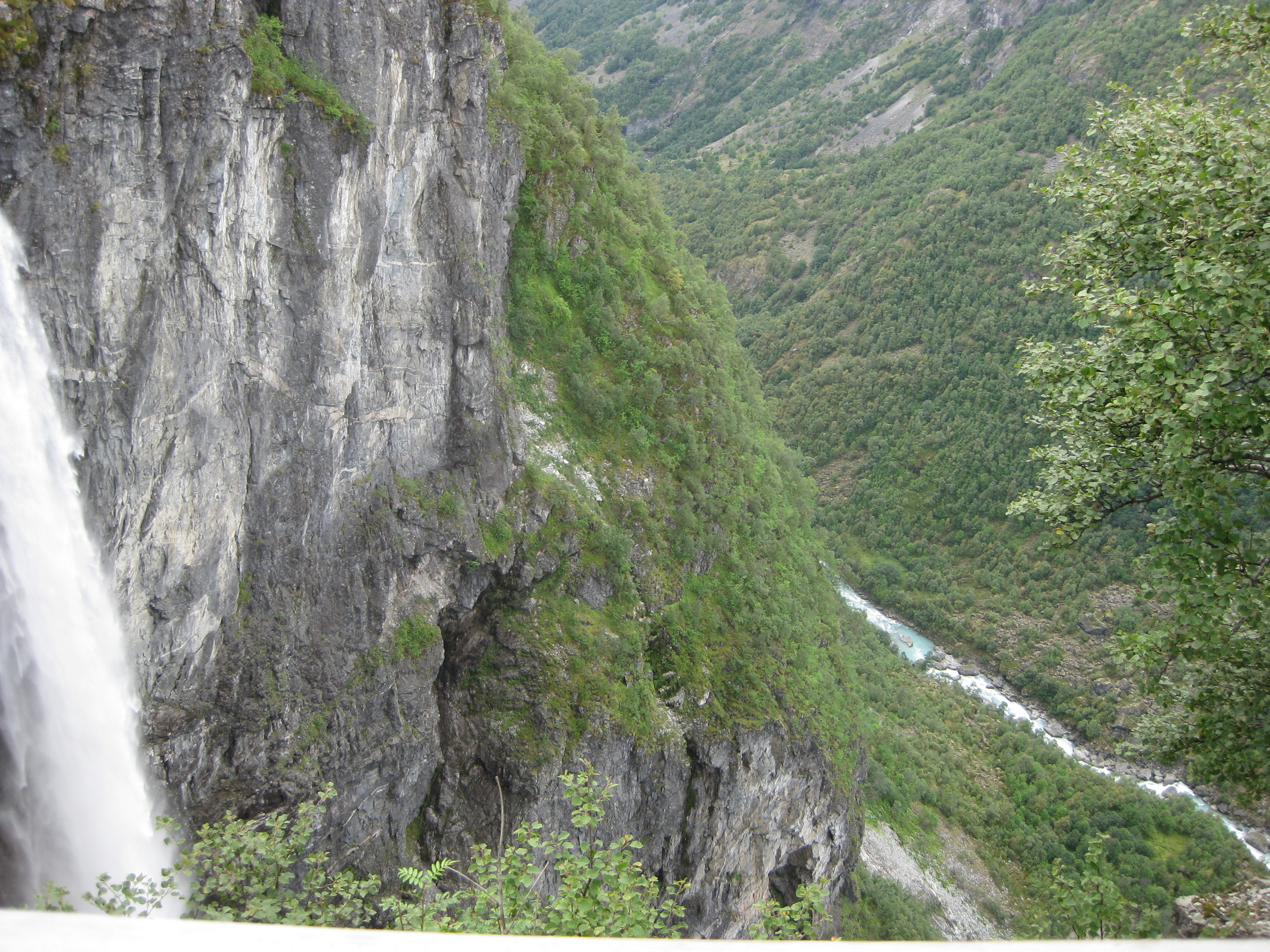 Blick ins Utladalen vom Vettisfossen